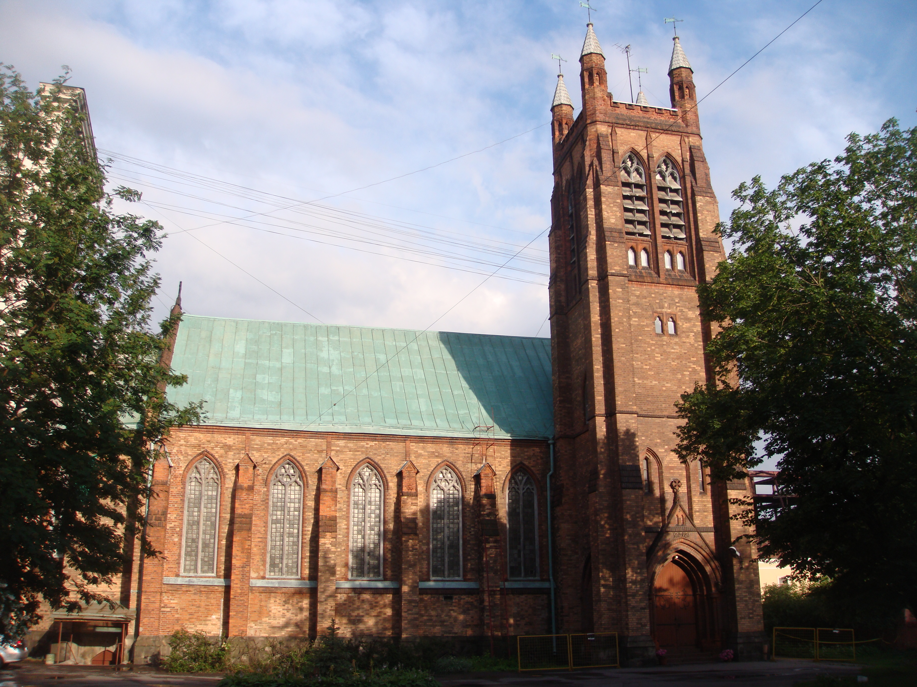 англиканский храм Св.Андрея